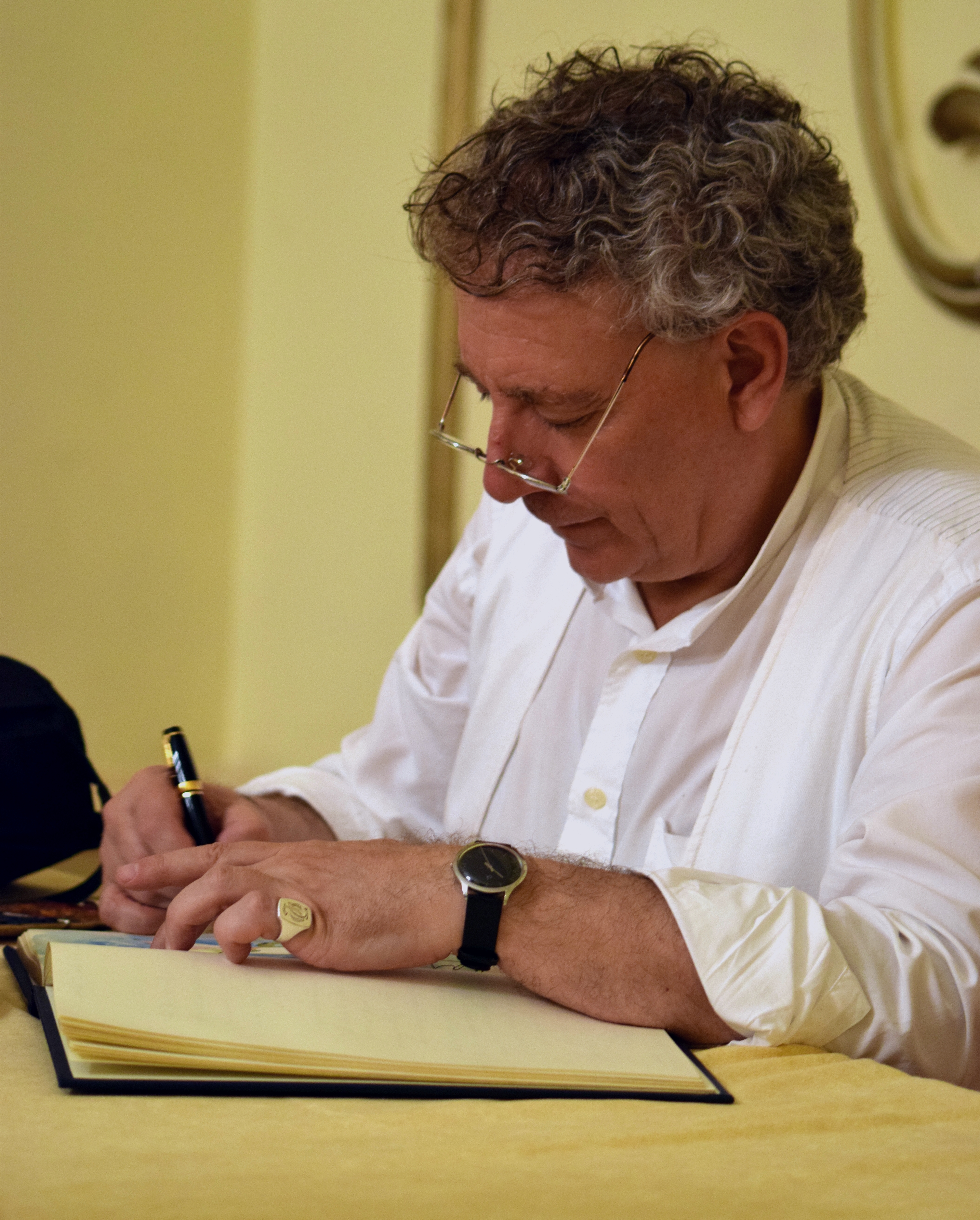 Juan Carlos Mestre pintando una de sus clásicas dedicatorias tras su recital en el Real Club Nautico de Sta. Cruz de La Palma en el II Encuentro de Escritores celebrado entre los días 4 al 8 de Octubre de 2017 en honor al fallecido poeta palmero Felix Francisco Casanova.